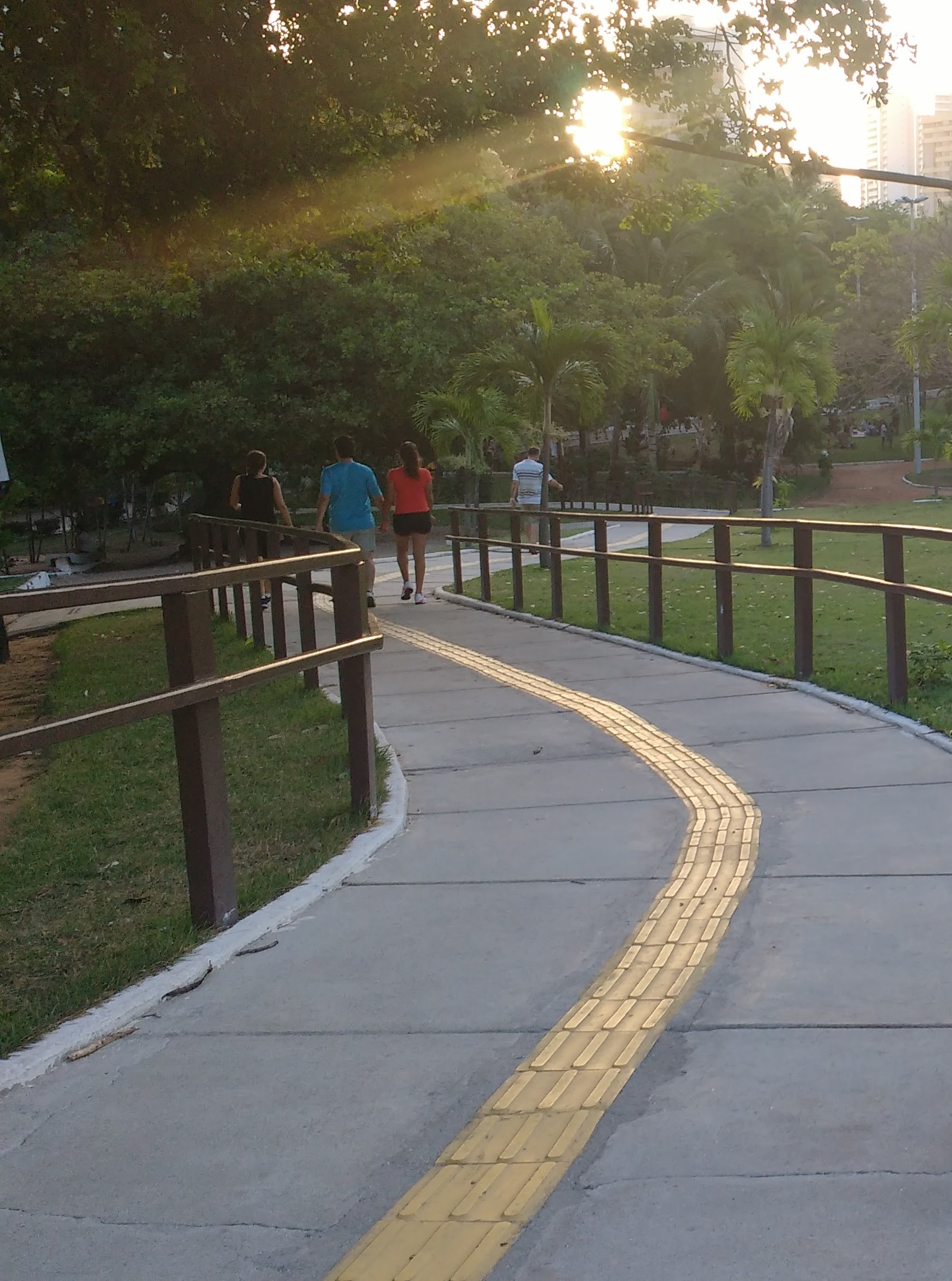 Pista para caminhada com piso tátil e corrimões para deficientes